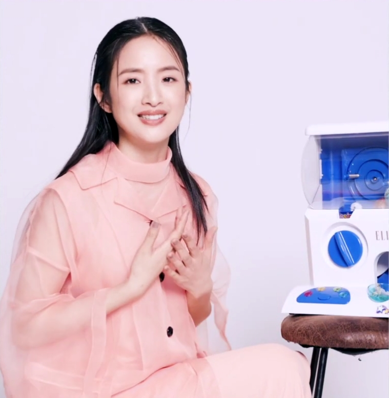 中文（中国大陆）: ELLE 2月封面人物林依晨